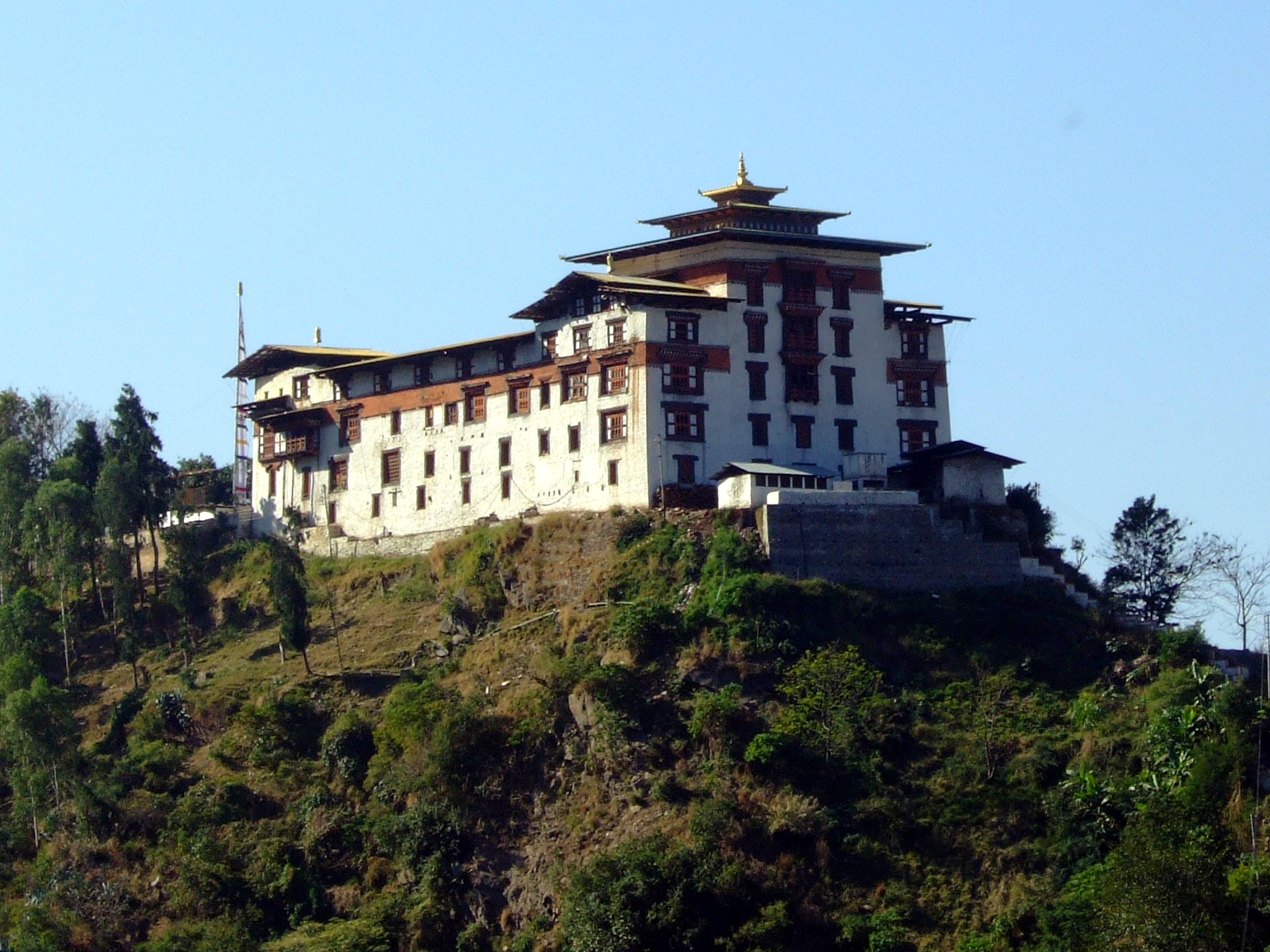 View of Trashigang Dzong, Trashigang, Bhutan